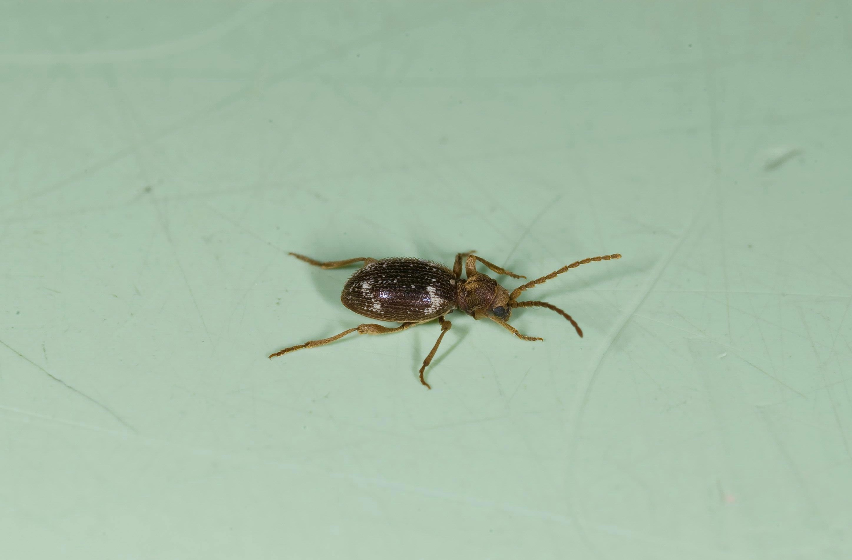 Ptinus fur